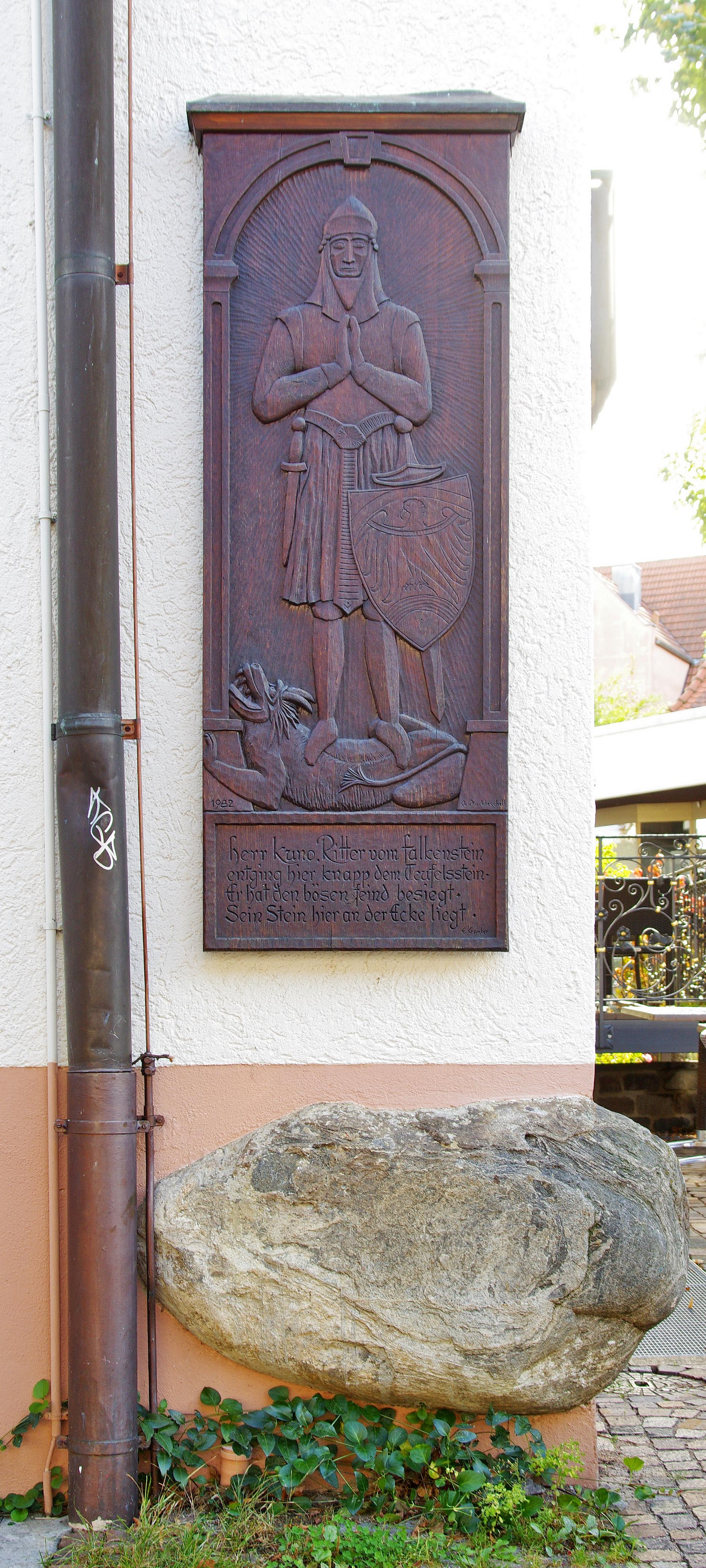 Herr Kuno, Ritter vom Falkenstein entging hier knapp dem Teufelsstein Er hat den bösen Feind besiegt Sein Stein hier an der Ecke liegt. E. Ganter